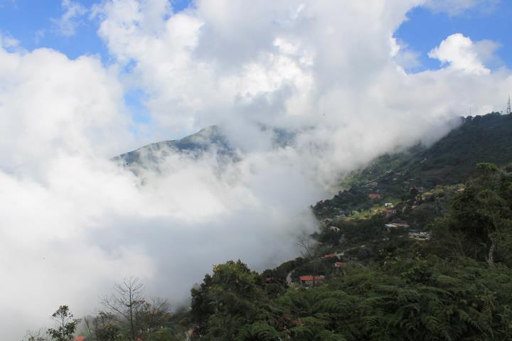 Galipan (Parque Nacional El Avila), estado Vargas - Venezuela (2008)